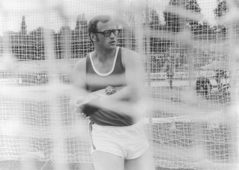 Jochen Sachse ADN-ZB Ludwig-24.08.1975-str-Erfurt: 26.DDR-Meisterschaften in der Leichtathletik (3.Tag) -Seiner Favoritenrolle im Hammerwerfen konnte der Karl-Marx-Städter Jochen Sachse gerecht werden. Mit 73,46 m wurde er neuer Titelträger.